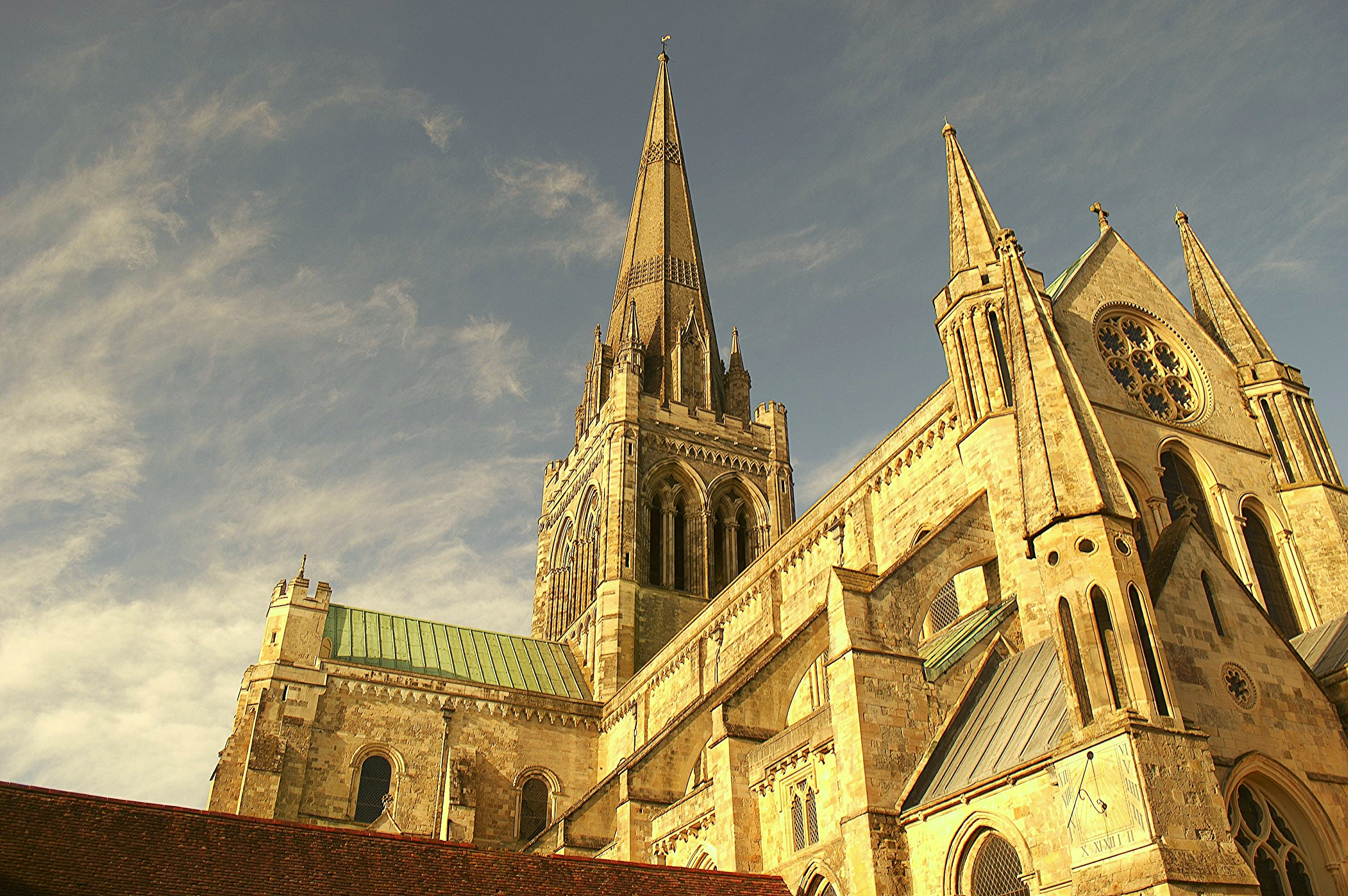 zdjęcie przedstawiające strzelistą wieżę (np. katedry) English | Polski | +/−